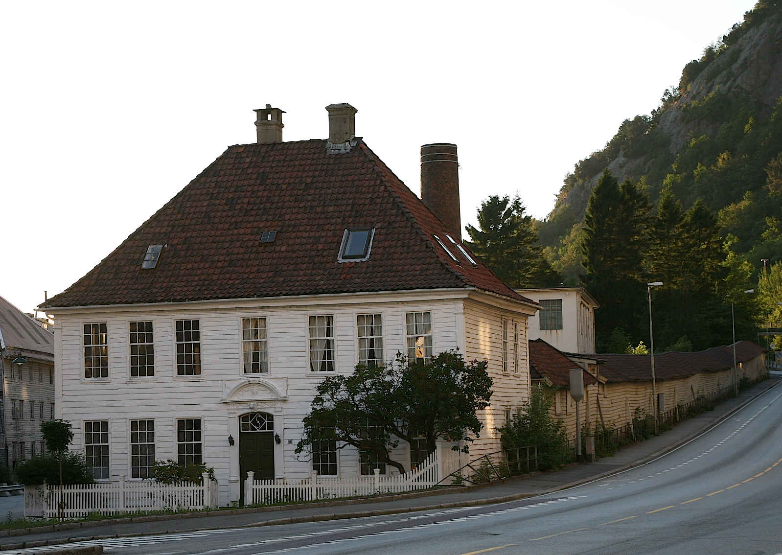 Reperbane i Sandviken i Bergen. Photo: Nina Aldin Thune